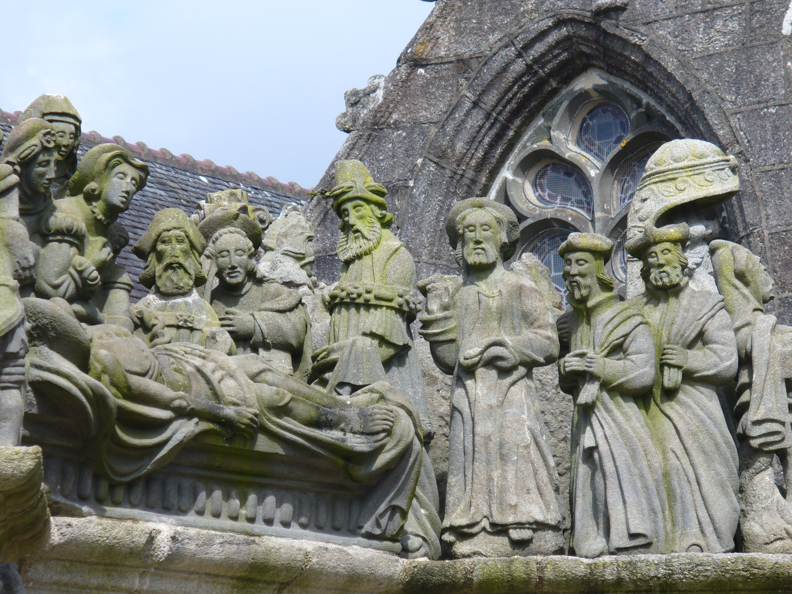 La mise au tombeau-Die Grablegung Christi-Calvaire-Kalvarienberg-Guimiliau-Saint Miliau-Enclos Paroissal-Umfriedeter Pfarrbezirk